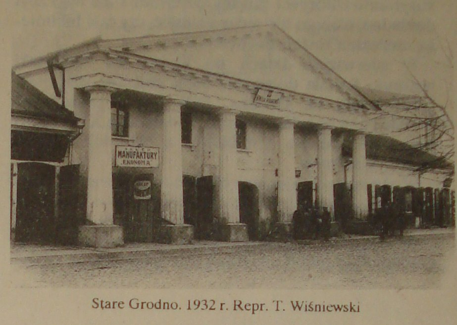 Беларуская (тарашкевіца): Фота Ратушы ў Гродна